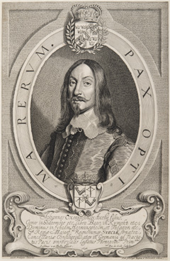 Johan Axelsson Oxenstierna, Kupferstich von Pieter de Jode nach Anselm van Hulle, 1648